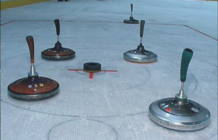 Расположение штоков в доме.